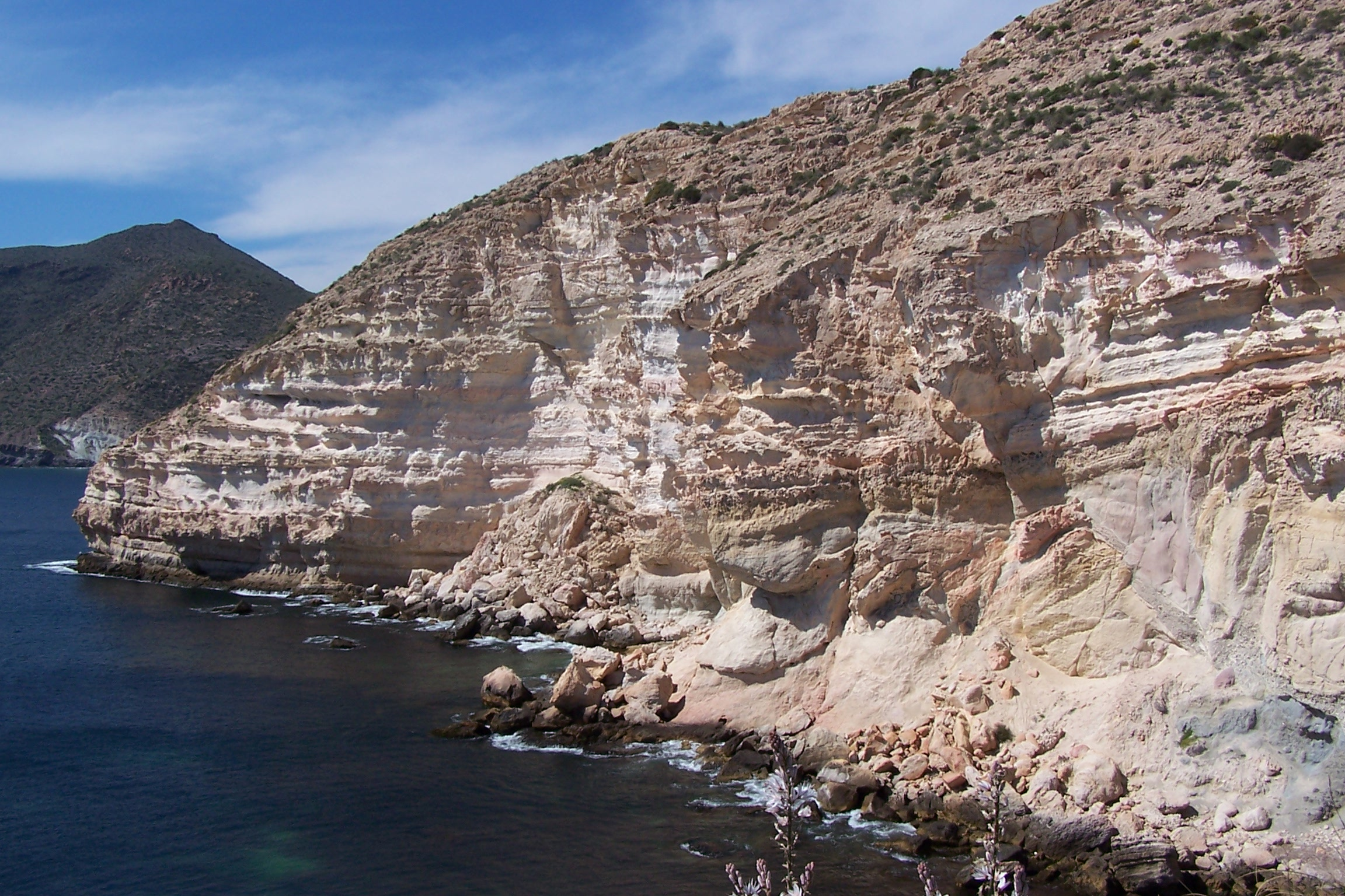 Eigen gemaakt werk 13-03-2006